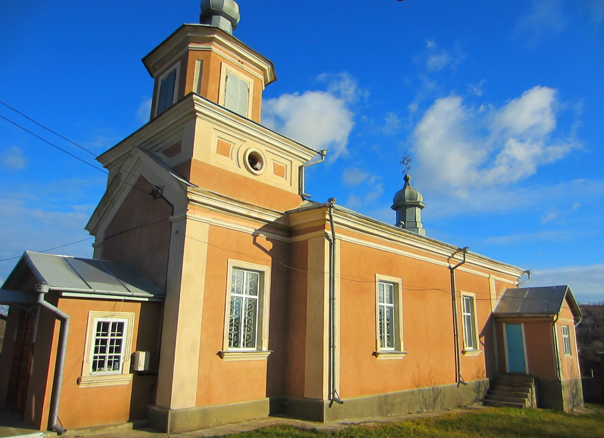 Biserica „Nașterea Maicii Domnului ” s. Zăicana,Criuleni